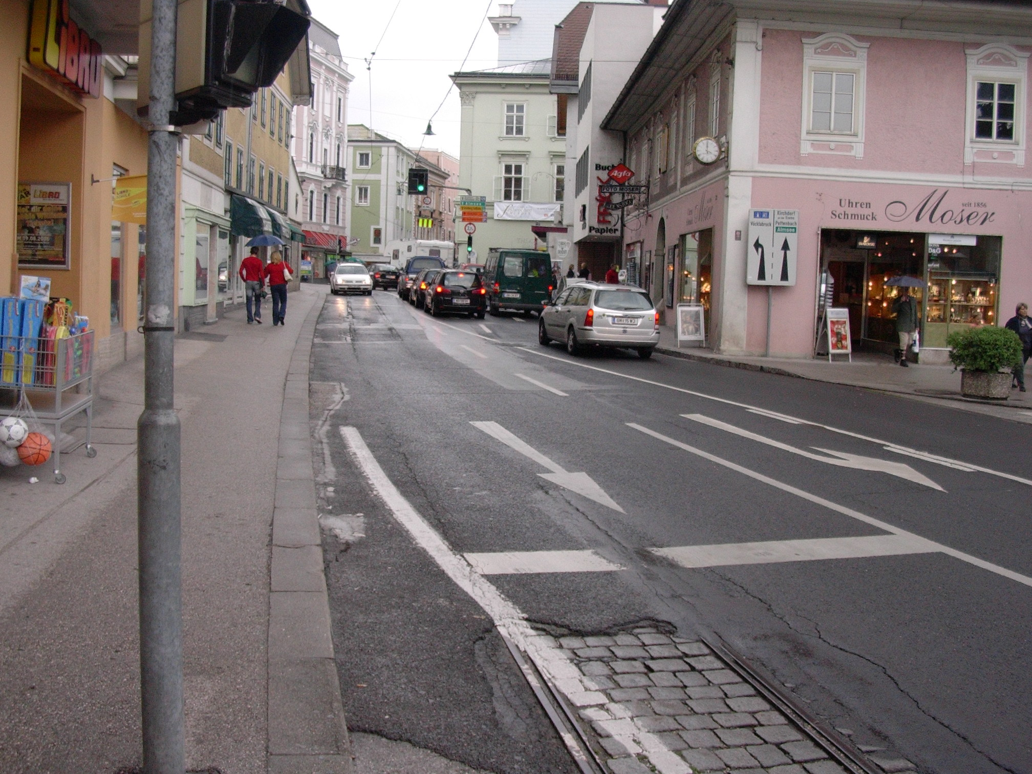 Endstation (bis 2018-08-31) Franz Josefs Platz, Blick Richtung Rathausplatz